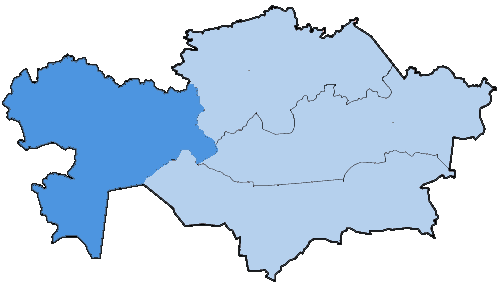 Mappa dell'Amministrazione Apostolica di Atyrau in Kazakistan. Lavoro personale eseguito a partire da File:Kazakhstan provinces numbered english.png di Commons. Fonte per i confini delle diocesi: Guida delle missioni cattoliche 2005, a cura della Congregatio pro gentium evangelizatione, Roma, Urbaniana University Press, 2005.